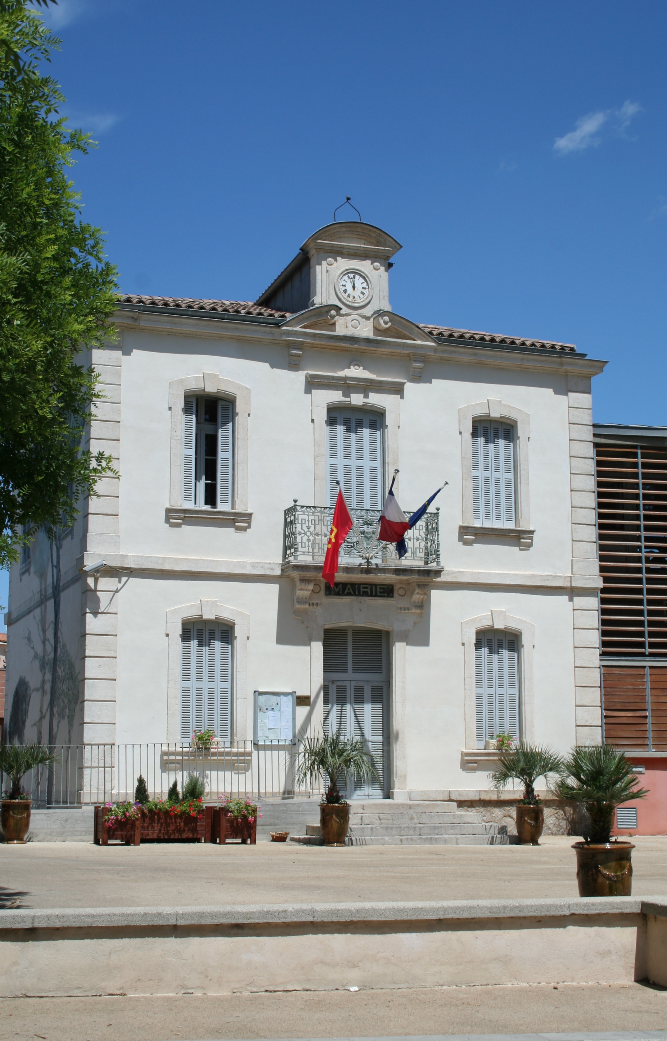 Gigean (France) - mairie.